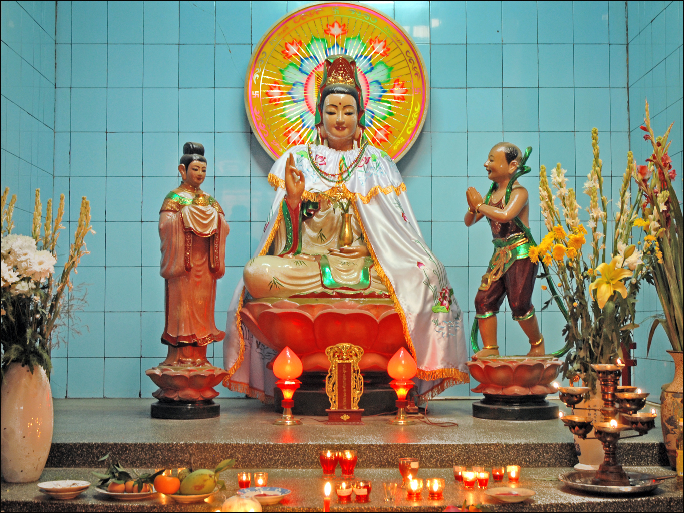 L'autel dédié à Guan Yin dans le Chùa Ông à Can Tho Ce temple a été construit par la congrégation des chinois de Canton. Mais la plupart des chinois ont quitté le Vietnam en 1978-1979 en raison des persécutions. Guan Yin (Quan Am pour les vietnamiens) est pour les chinois, la "Déesse de la Miséricorde" , c'est à l'origine le Bodhisattava de la compassion : Avalokiteshvara ou Avalokitesvara (Celui qui regarde vers le bas), le principal Bodhisattava du bouddhisme du Grand Véhicule. Il est représenté en Chine sous une forme féminine à partir du Xème siècle. Guan Yin est vénérée dans tout le monde asiatique notamment pour avoir un enfant ou pour être protégé lors d'un voyage en mer. Les attributs et représentations de Guan Yin sont très nombreux. La divinité peut être figurée debout ou assise, souvent en robe blanche, avec à la main, plusieurs attributs comme une branche de saule, un vase d'eau lustrale, un livre, un lotus, un rosaire,.. . Elle peut être assise en méditation et avec un enfant dans les bras. Elle peut avoir de nombreux bras symbolisant les secours qu'elle apporte. Elle est souvent entourée de dévots et de donateurs. Article de Wikipedia sur Avalokiteshvara Voir aussi d'autres statues de Guan Yin (ou Guanyin)